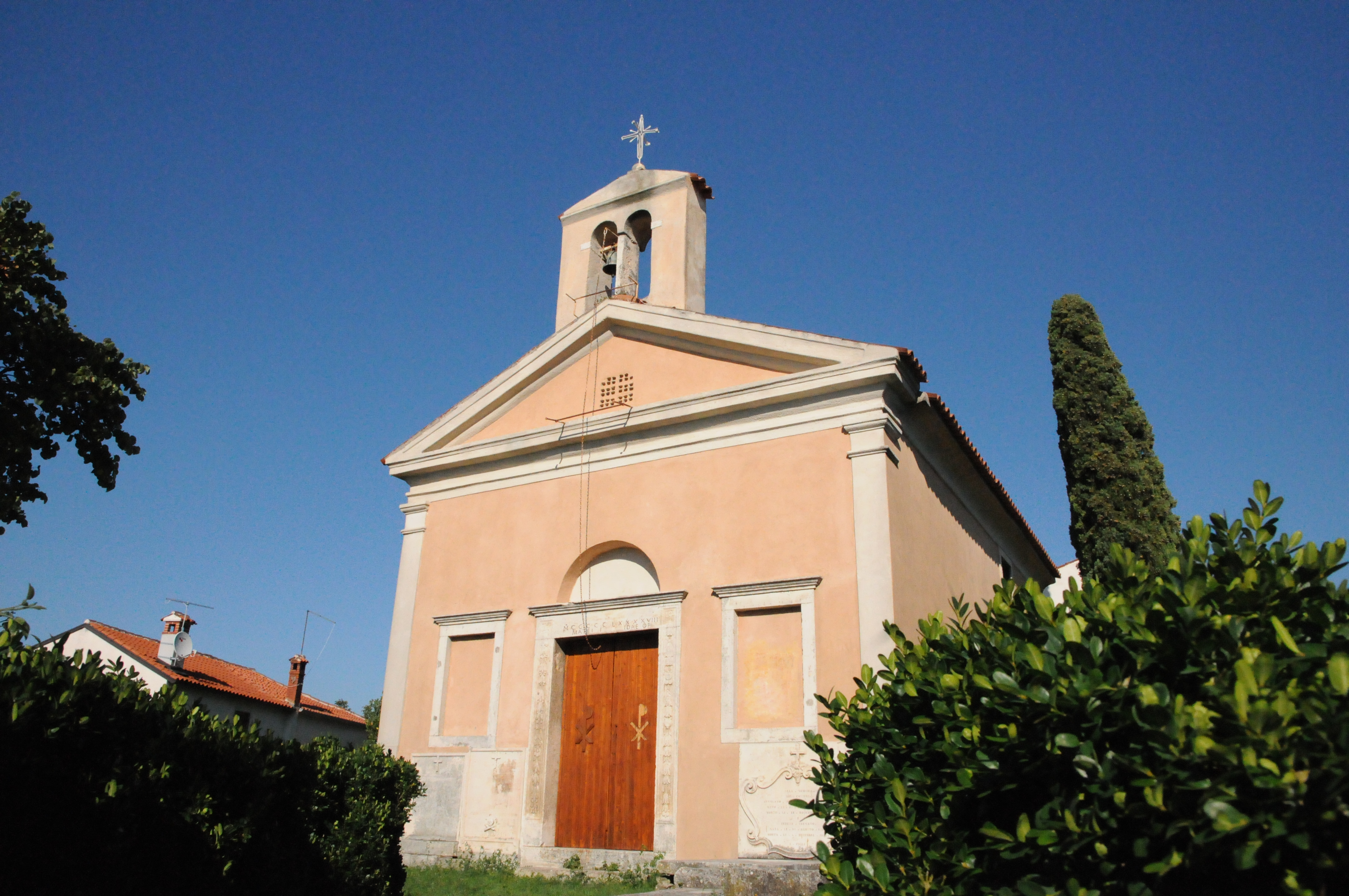 Chiesa di San Martino: è situata a Buie (Croazia), nell'omonimo cimitero monumentale.